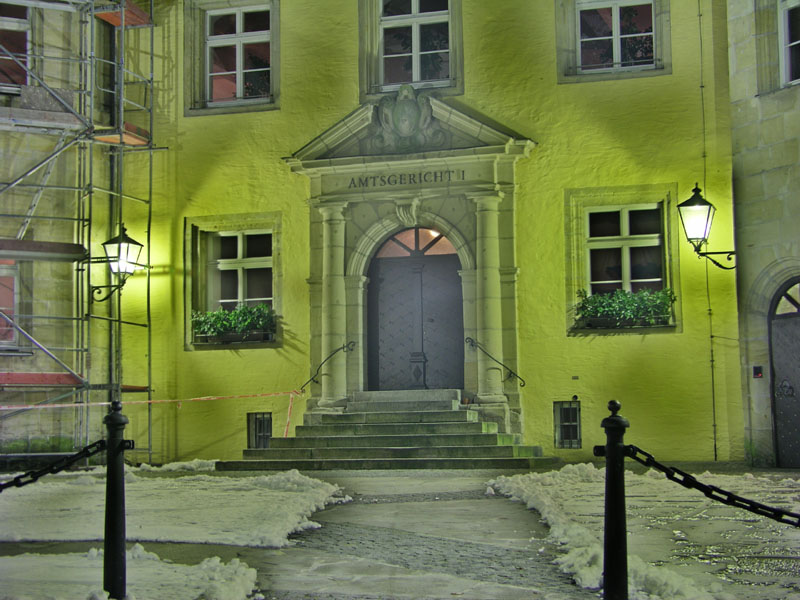 Hersbrucker Amtsgericht